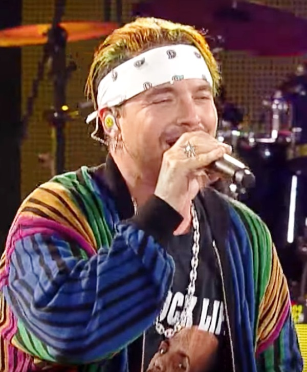 Directamente desde Medellín, Colombia, José Álvaro Osorio Balvin, conocido por su nombre artístico como J BALVIN, se presenta por primera ante el público chileno eligiendo al “monstruo” de la Quinta Vergara como primer jurado de su show, entregando una performance sobre el escenario que mantuvo encendida a las más de 15 mil personas que asistieron a esa noche de cierre del Festival de Viña 2017.